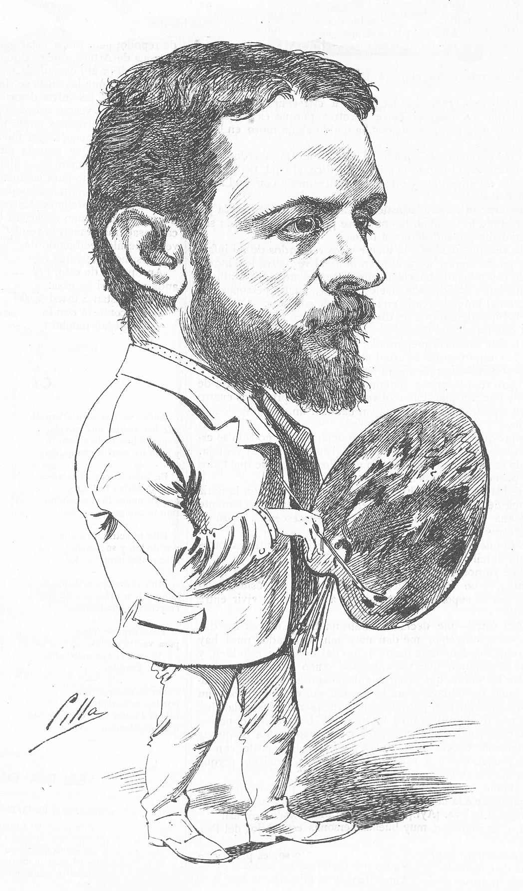 Eduardo Pelayo.